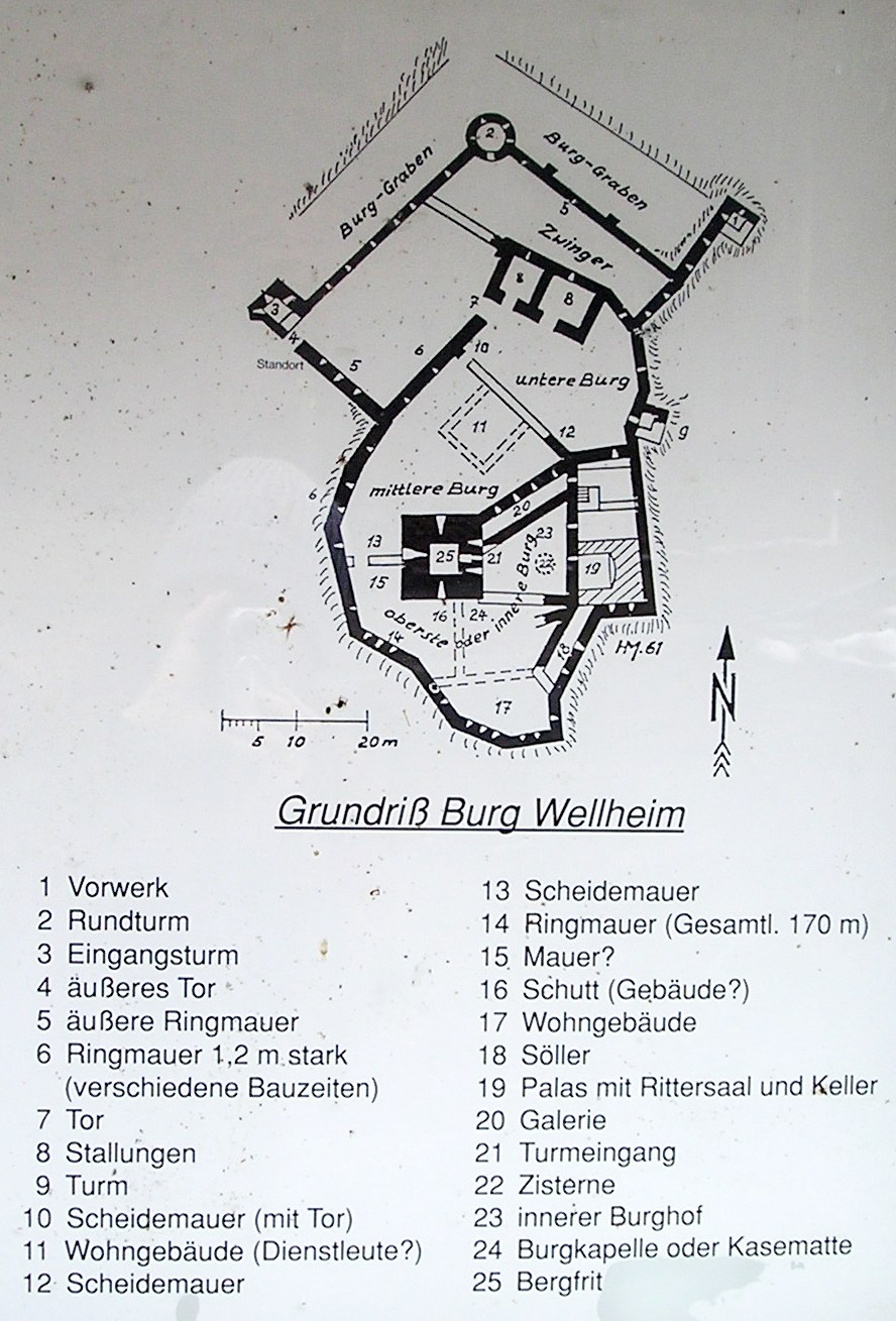 Burgruine Wellheim im Landkreis Eichstätt, Plan auf Info-Tafel unterhalb der Burg